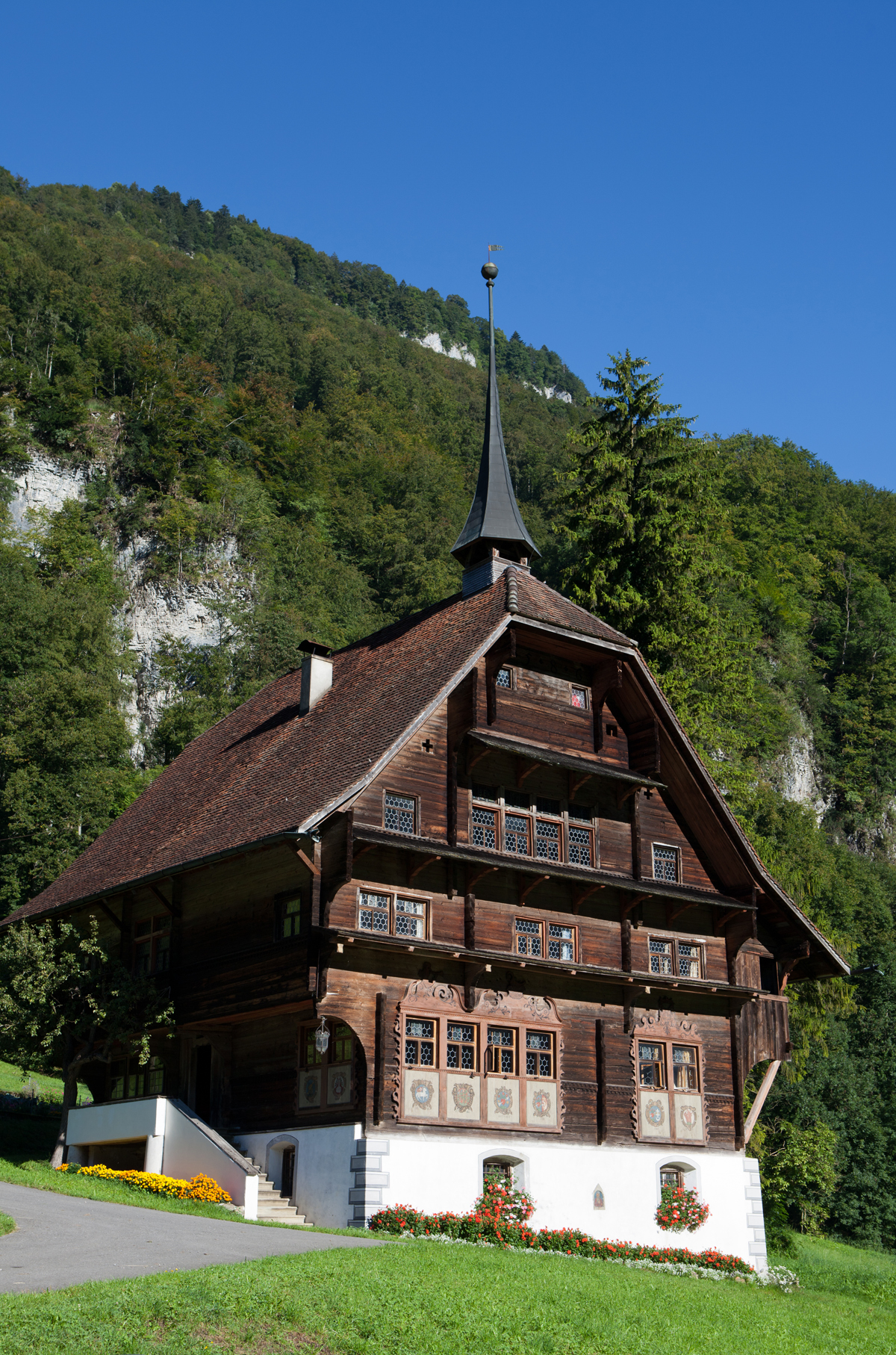 Hechhuis oder Lussyhaus in Wolfenschiessen, Kanton Nidwalden